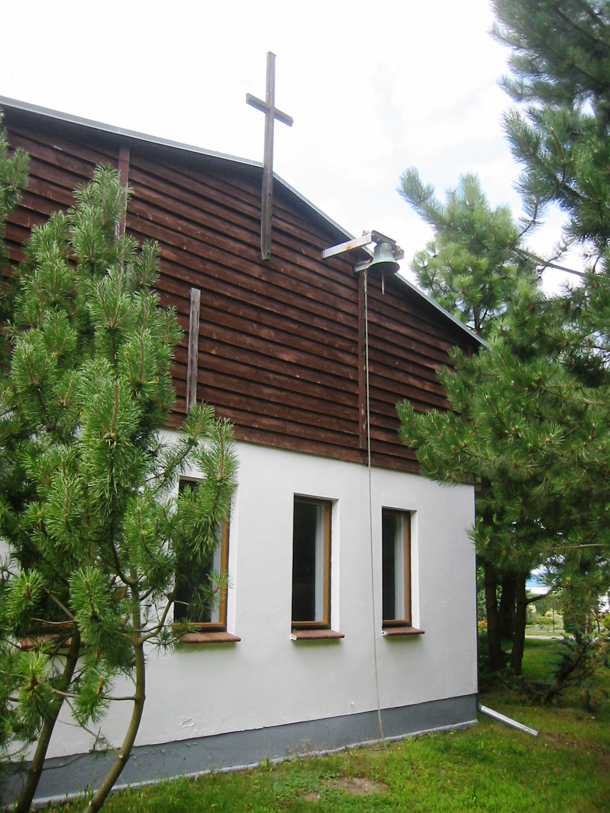 Ansicht der Bethlehemkirche in Spandowerhagen, ein Ortsteil der Gemeinde Kröslin im Landkreis Vorpommern-Greifswald (Mecklenburg-Vorpommern).